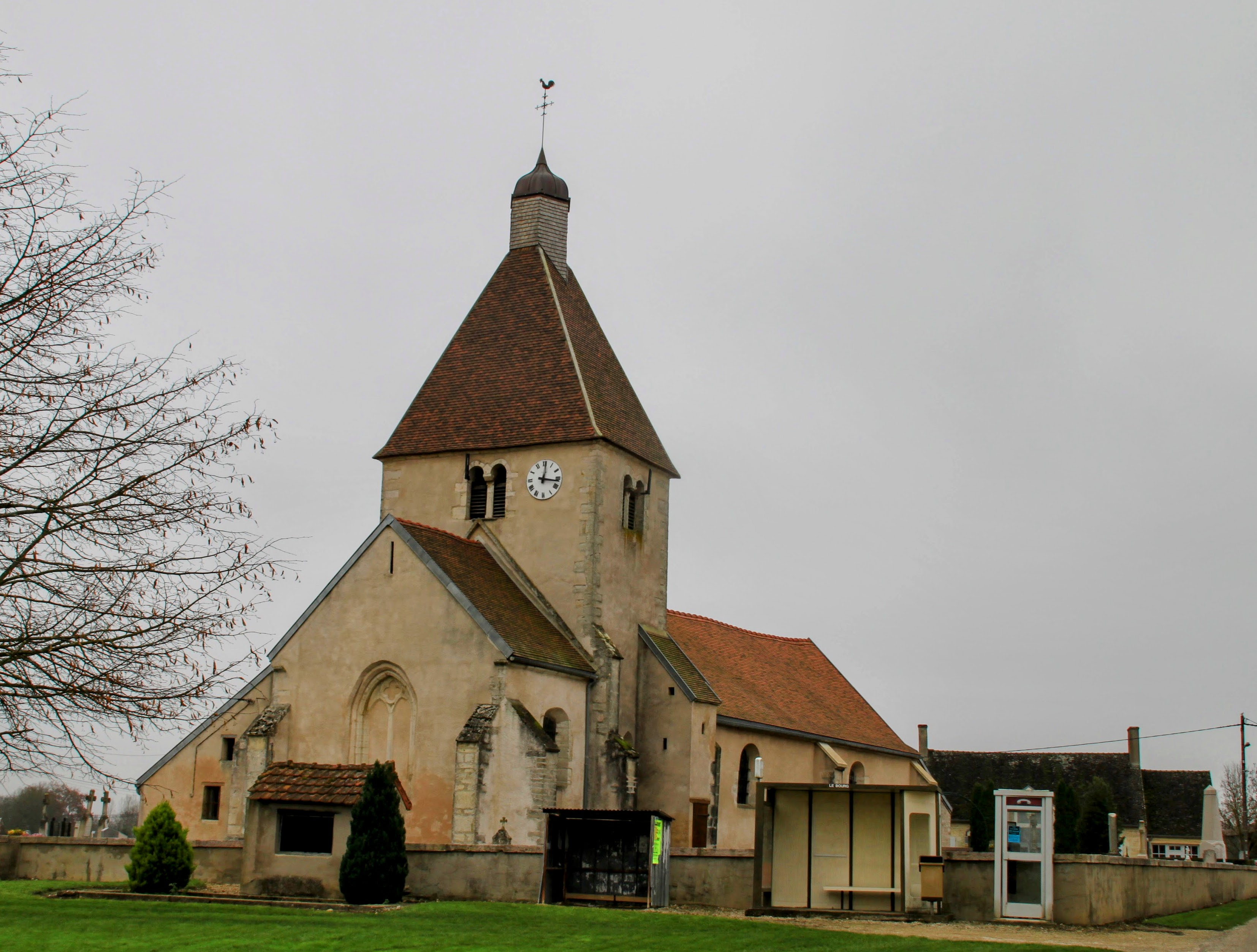 Kirche von Pourlans (Saône-et-Loire)